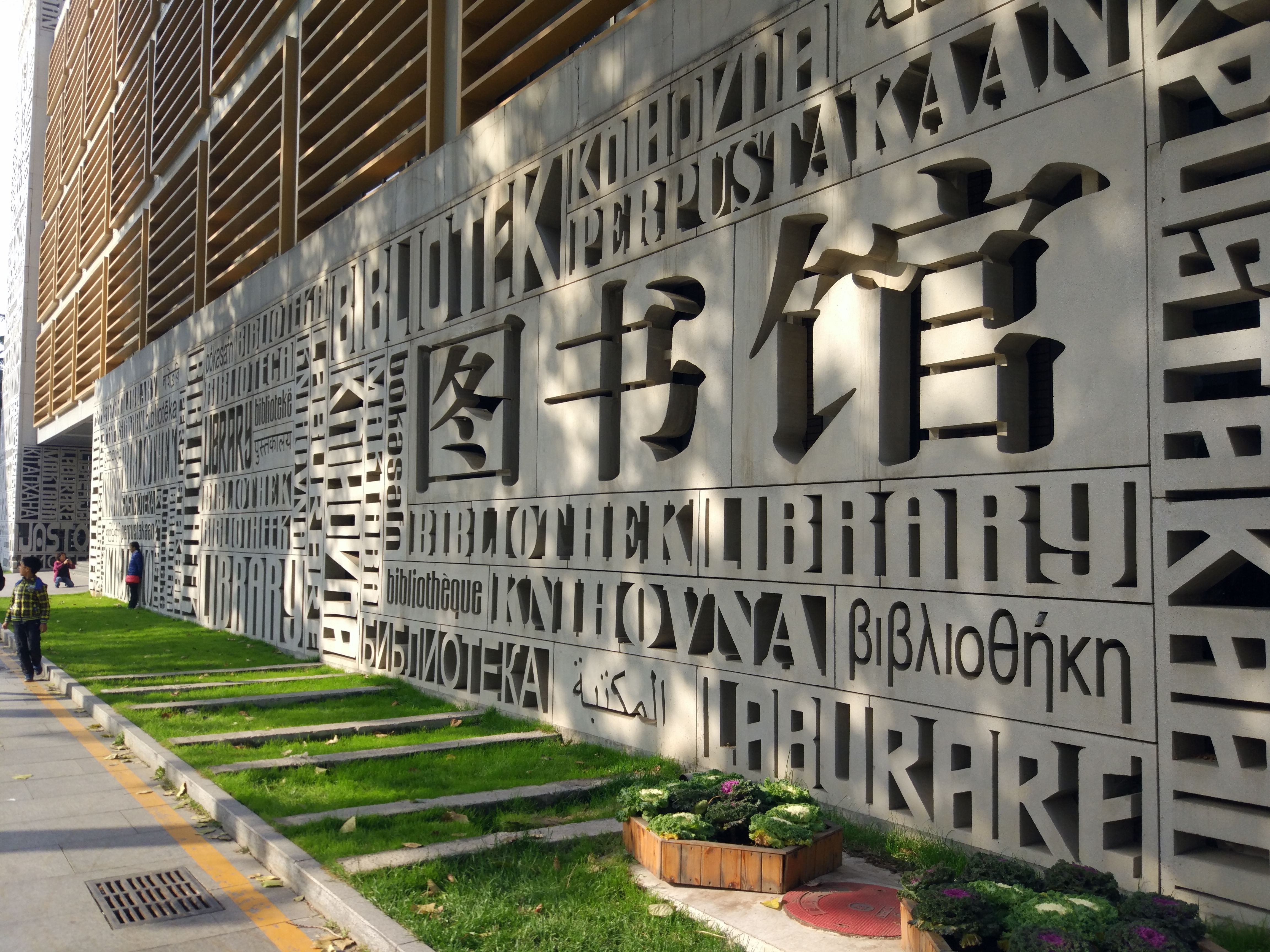 北京外国语大学图书馆，新馆大门外侧的多语种装饰墙，摄于2016年11月